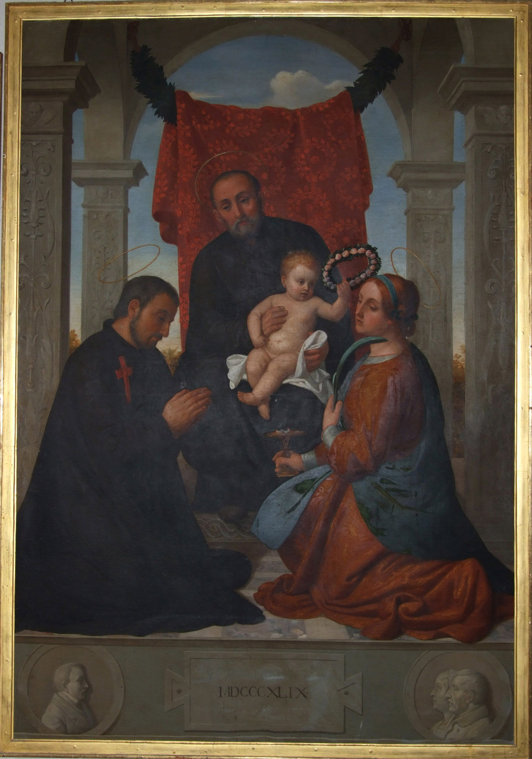 Quadro di Antonio Bianchini raffigurante i Santi Gaetano, Camillo e Lucia e il Bambino Gesù